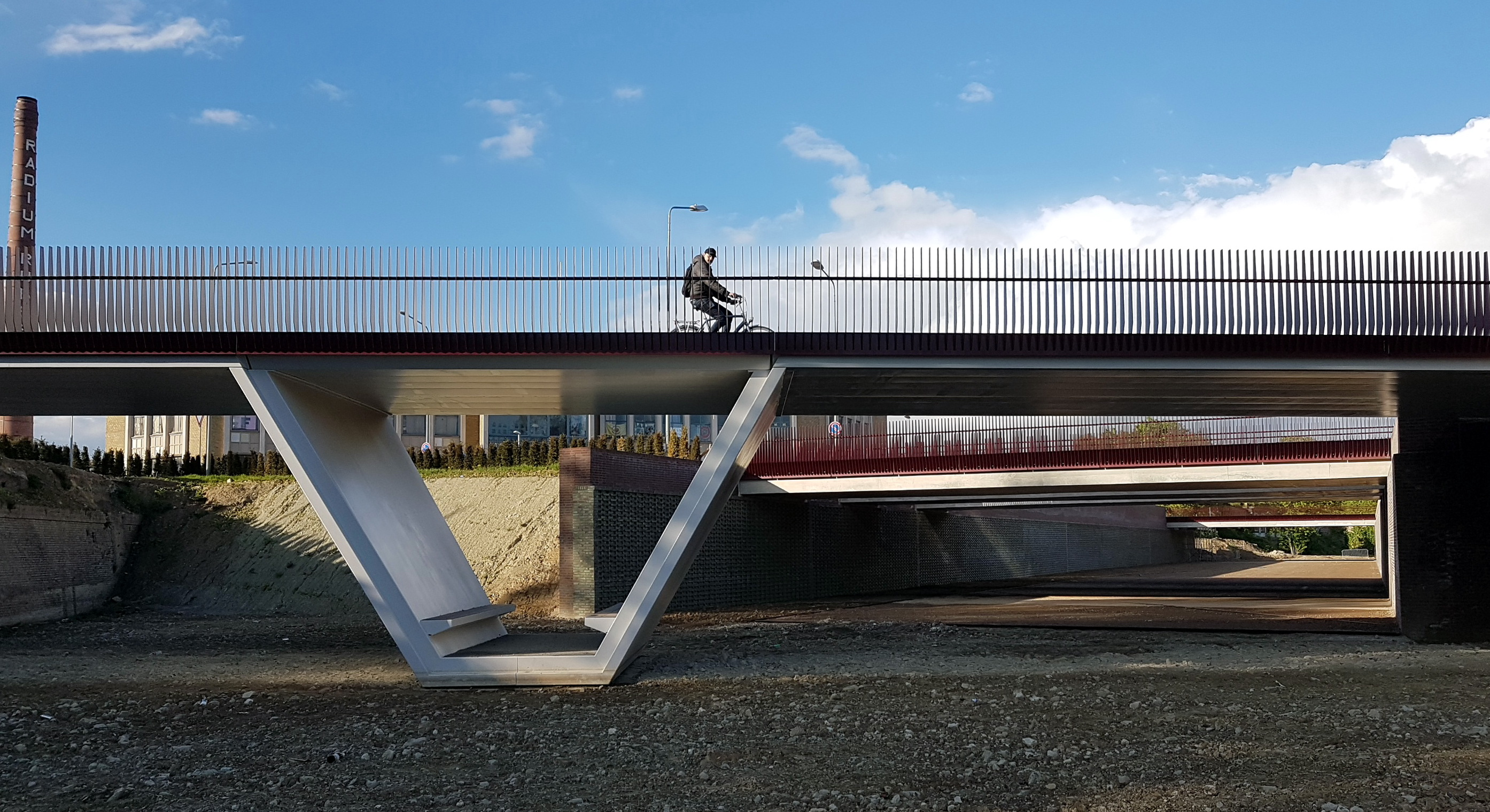 Zicht op een vijftal verkeers-, fiets- en voetgangersbruggen nabij de Cabergerweg in Maastricht. De bruggen zijn onderdeel van de nieuw aangelegde droge gracht tussen de Hoge en Lage Fronten (eigenlijk: Linie van Dumoulin en Nieuwe Bossche Fronten), die twee losse delen van het Frontenpark met elkaar verbindt.